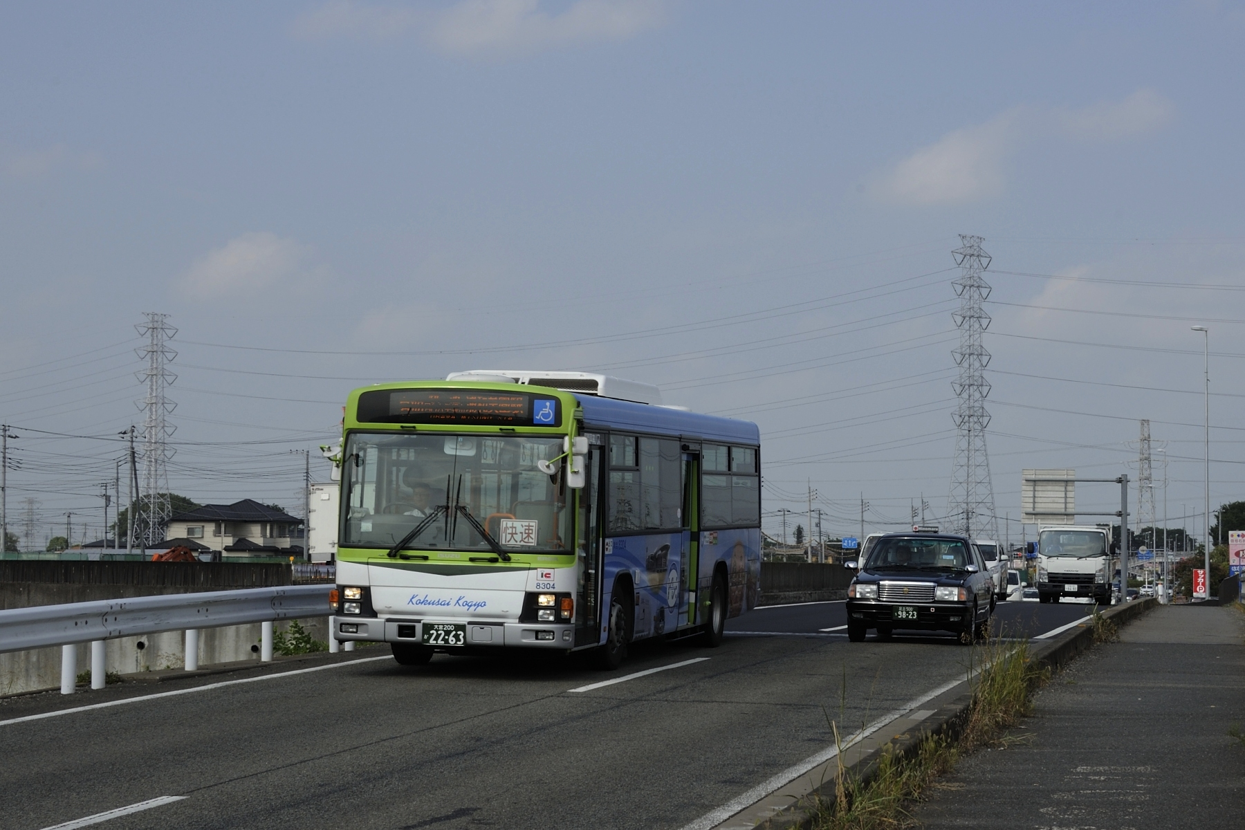 快速バス・岩101に充当の専用車8304